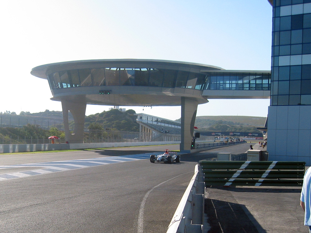 Fotografía del circuito de Jerez